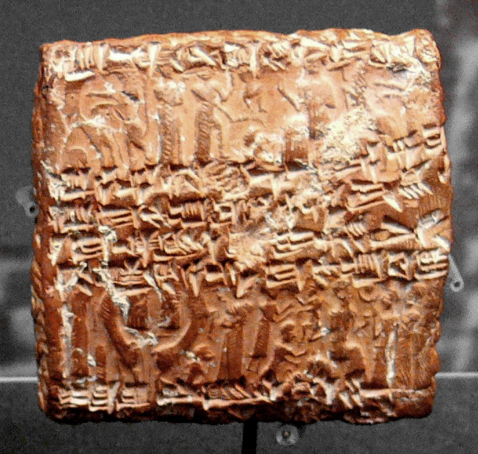 Schaffhausen, Museum zu Allerheiligen, Sammlung Ebnöther, (Abteilung "Schrift") Keilschrifturkunde, Ton, 5,5 x 6 x 3 cm, Anatolien, Kültepe, altassyrisch, 1900–1700 v. Chr. (Katalog 1999, S. 274)